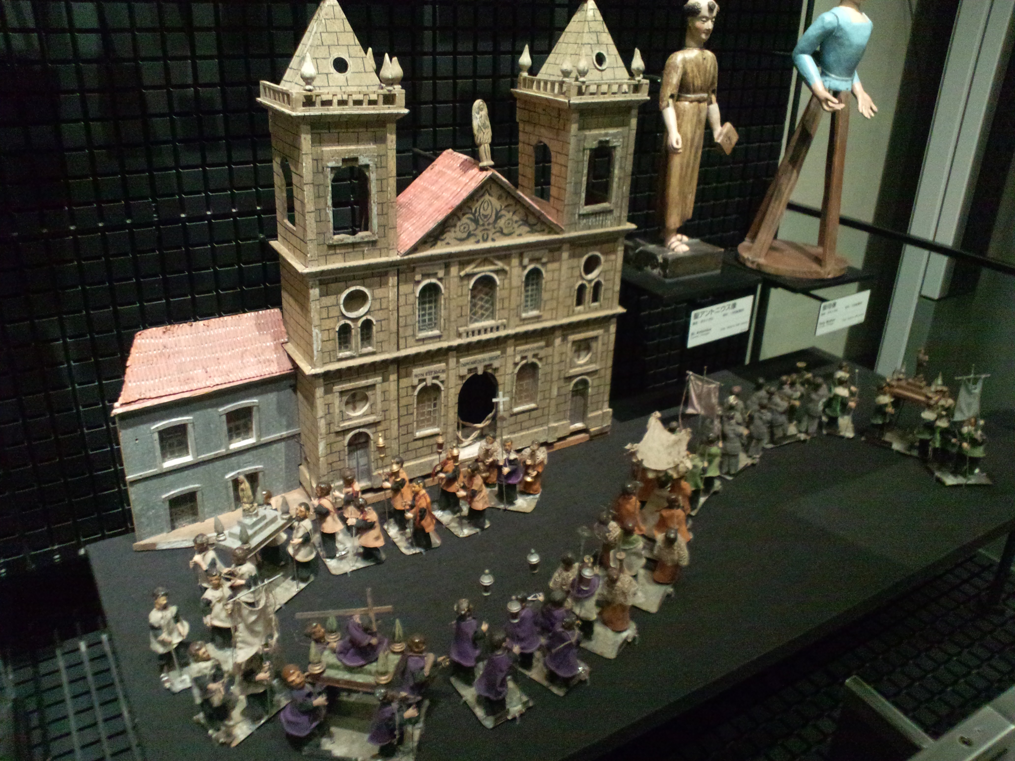 国立民族学博物館（大阪） 教会行列人形（ポルトガル、1930年代制作）